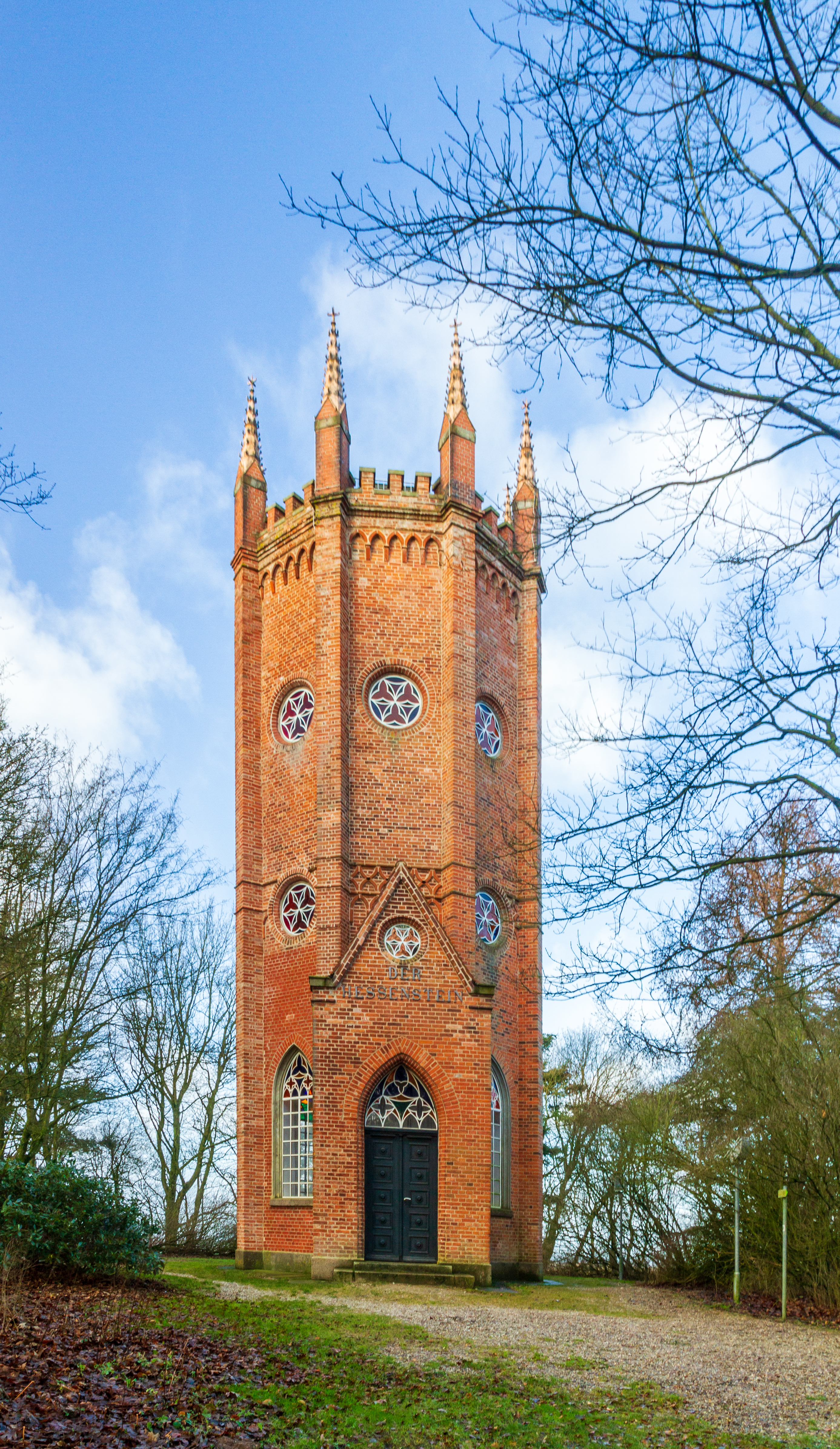 Der Hessenstein auf dem Pielsberg, Gut Panker im Landschafsschutzgebiet "Endmoränengebiet mit Hessenstein zwischen Lütjenburg und Hohenfelde und Umgebung"